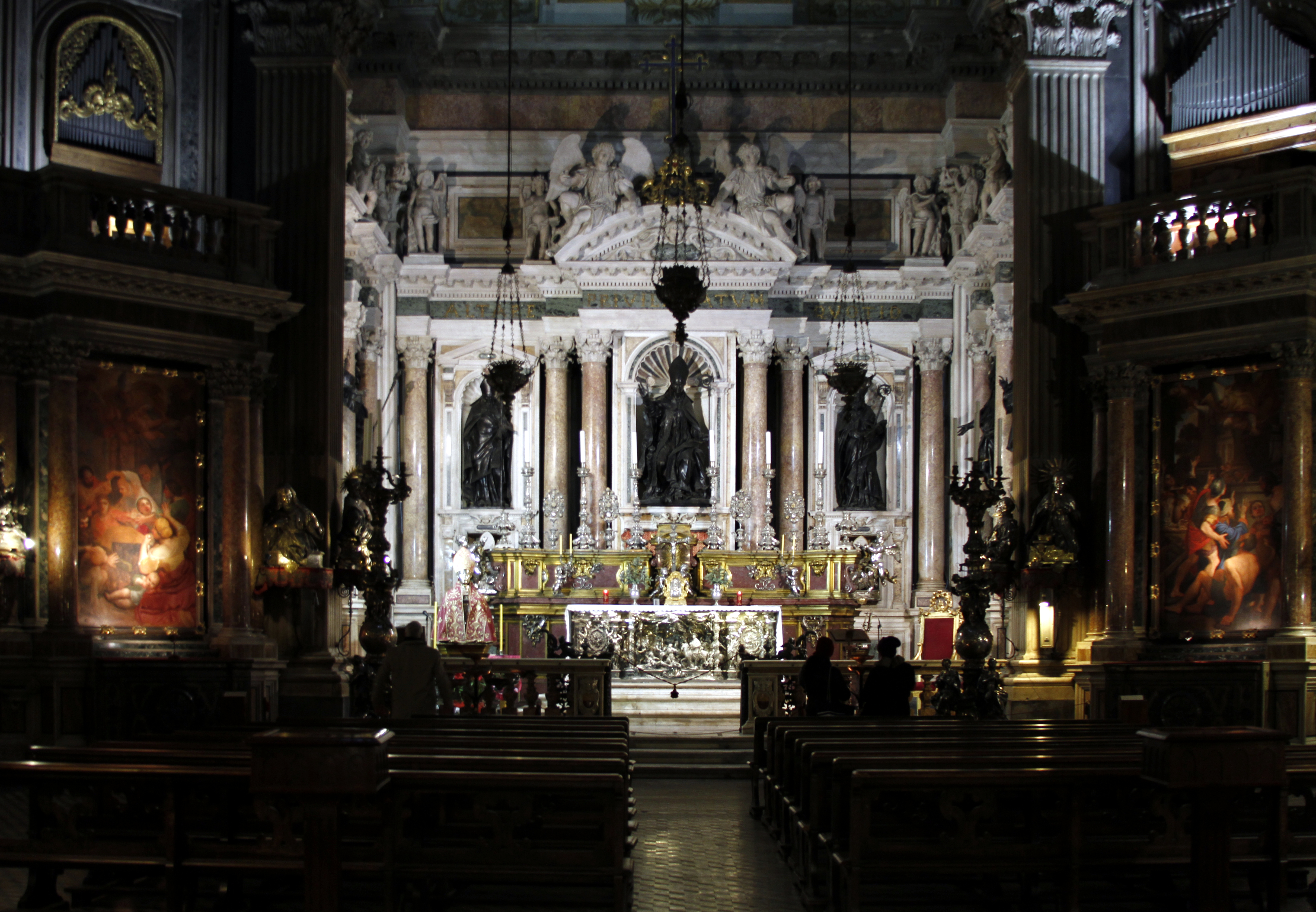 Cappella di San Gennaro, Catedral de Nápoles